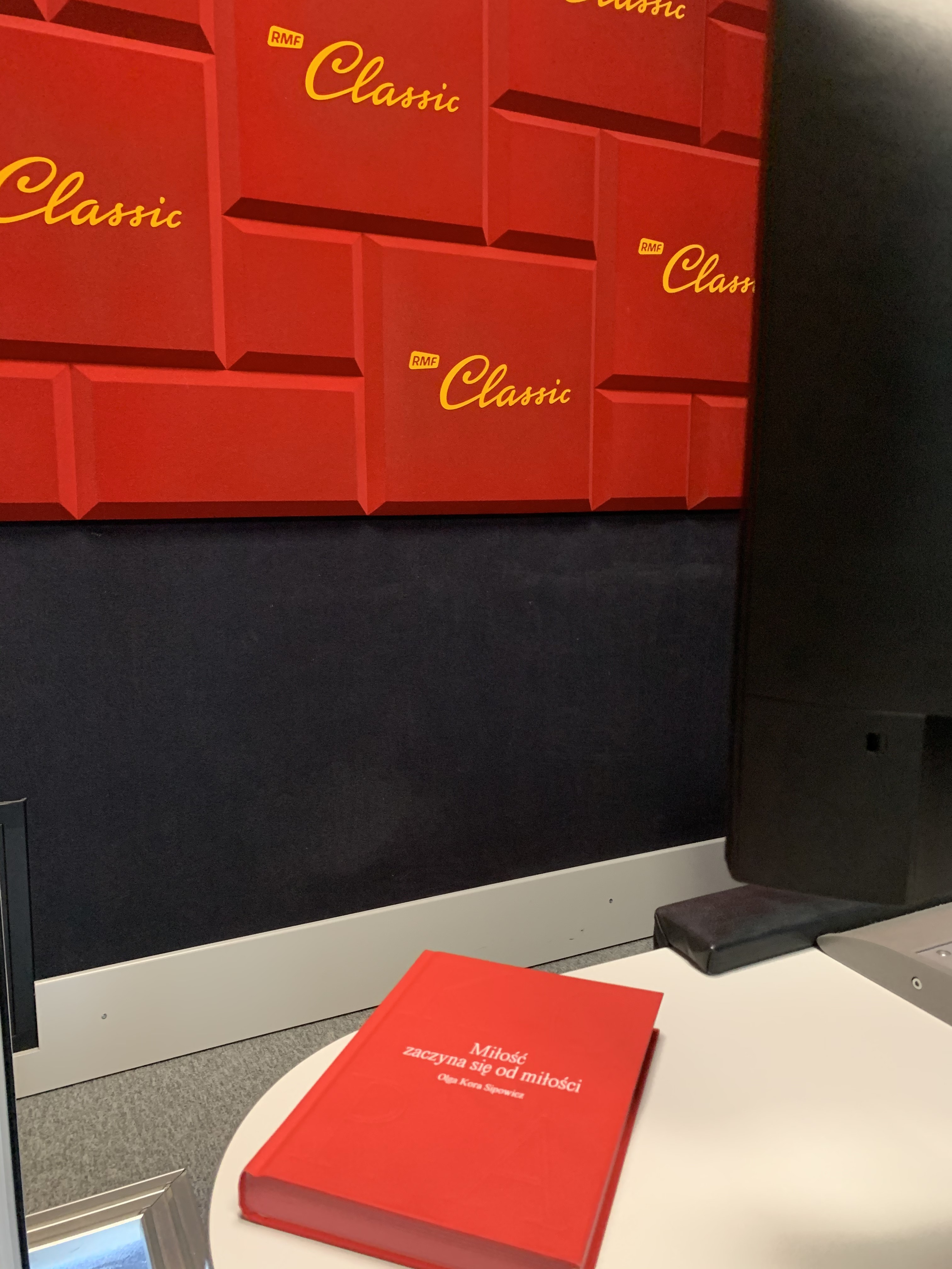 Książka autorstwa Olga Kora Sipowicz. Redakcją, posłowie oraz przypisy wraz z komentarzami: Tomasz W. Michałowski